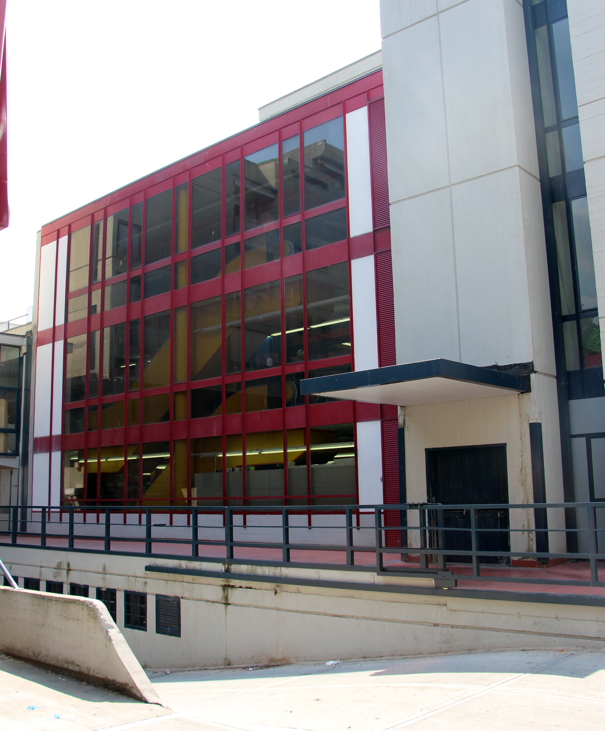 Sesto Fiorentino